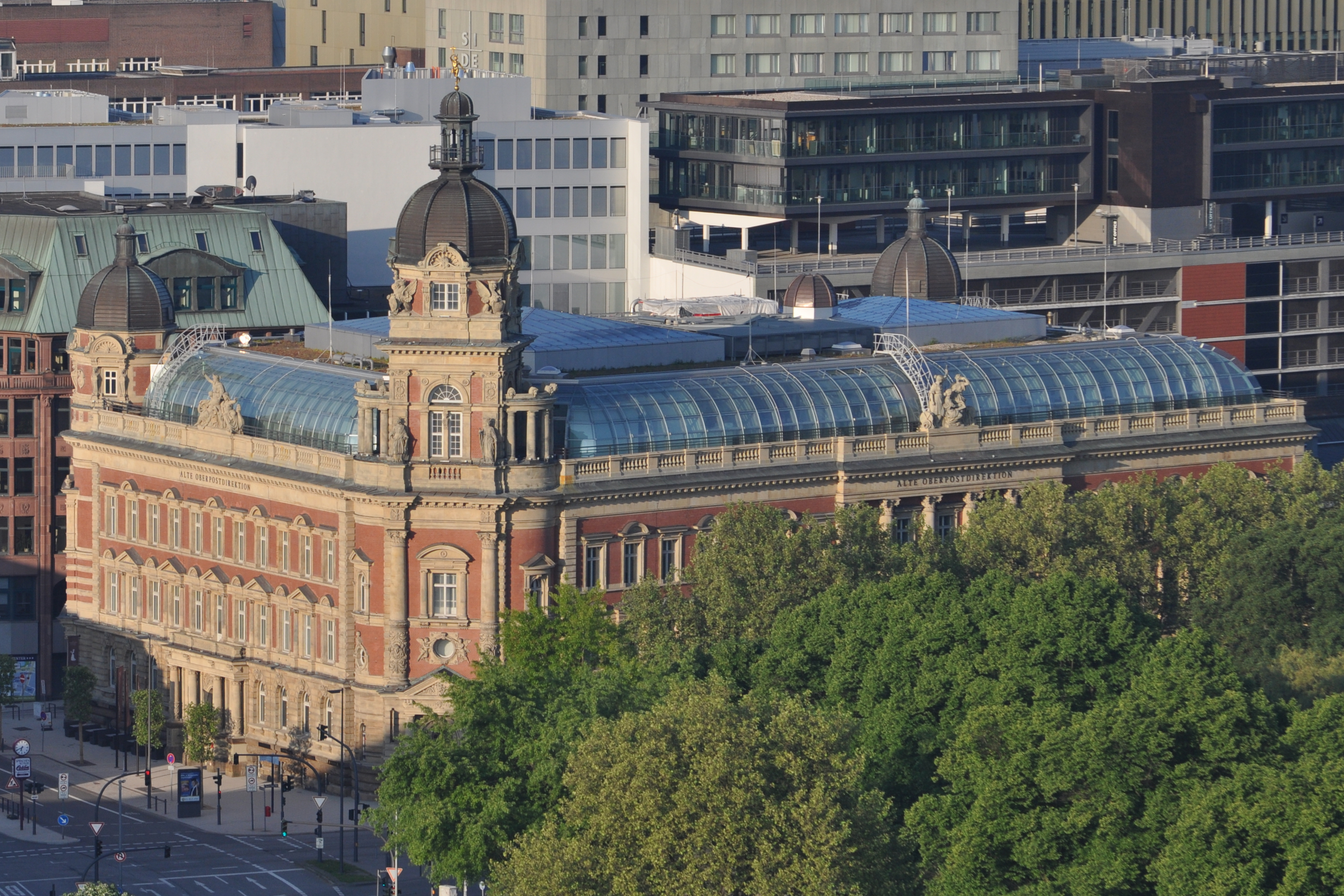 Alte Oberpostdirektion in Hamburg-Neustadt This is a photograph of an architectural monument.